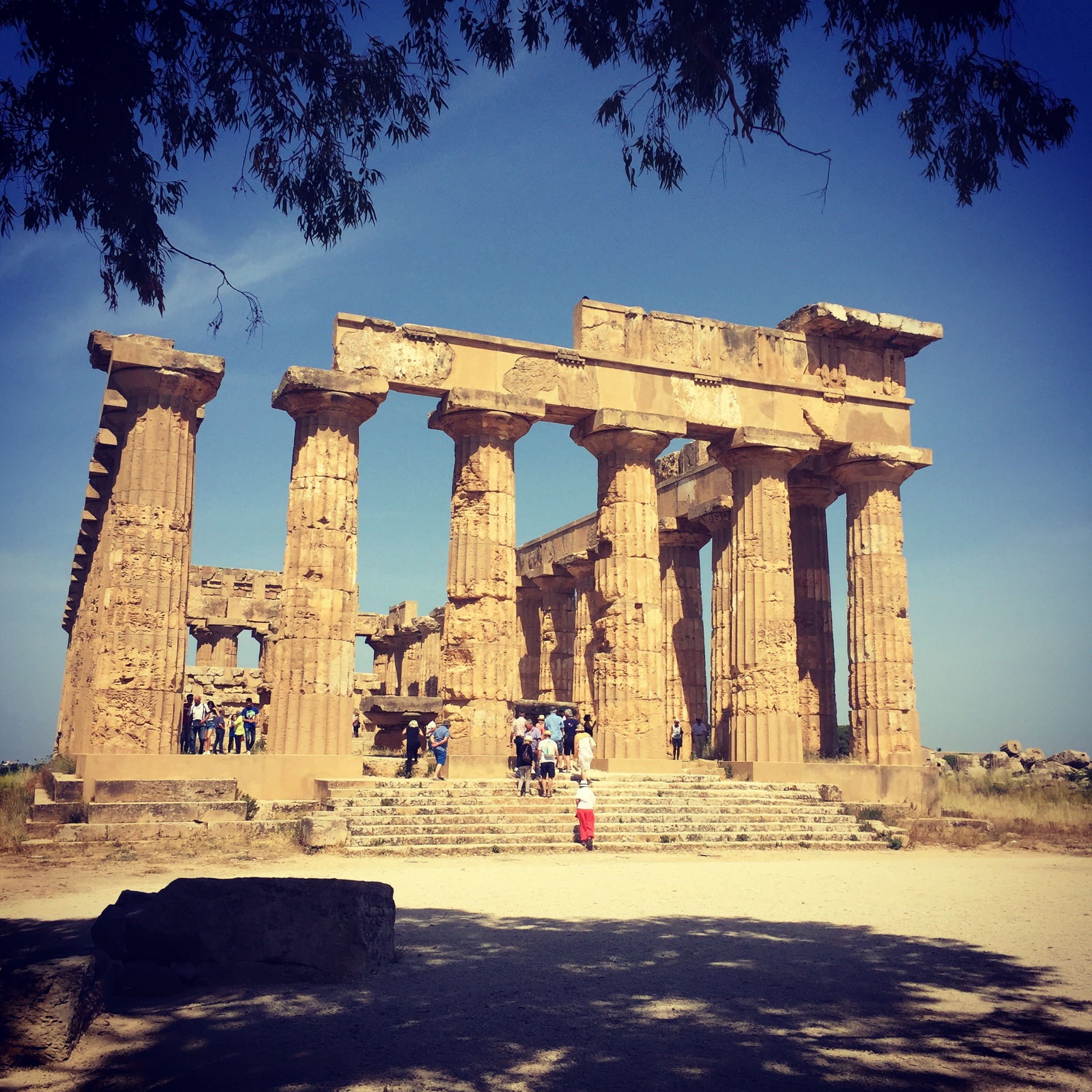 Tempio di Hera, Selinunte